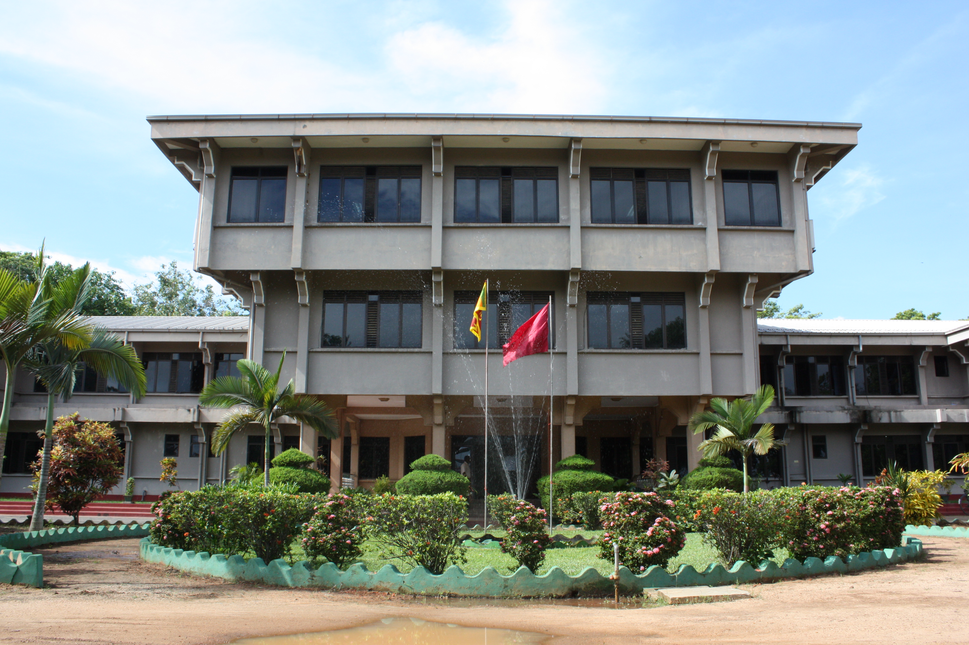 Silver jubilee building of EUSL